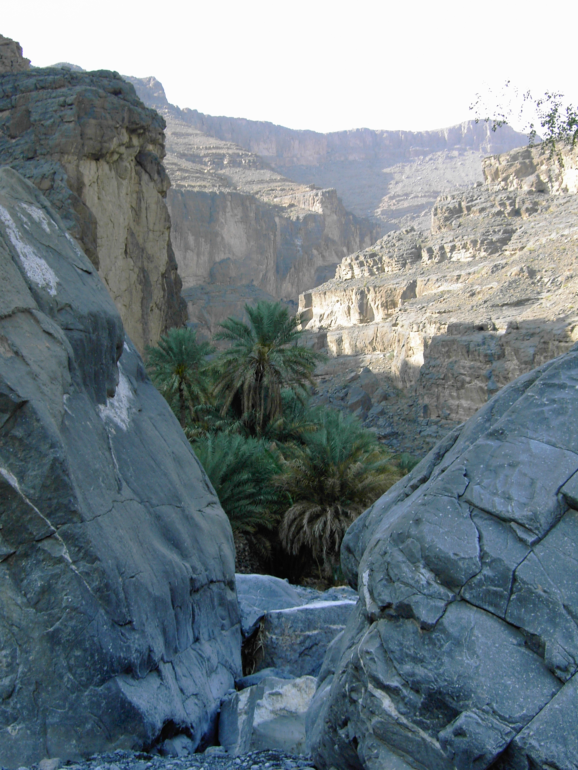 Das Wadi Ghul im Hajjar Gebirge gilt als der "Grand Canyon" Omans; die Felsen fallen bis 1000m zum Talboden teils senkrecht ab.